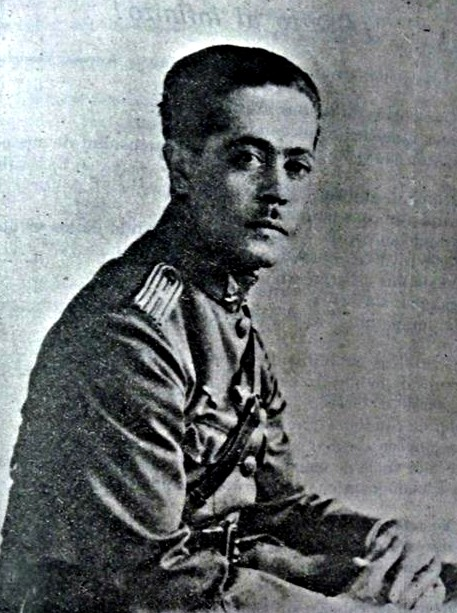 Teniente Vicente Landaeta Gil (1897-1931) - Fuerza Aerea Venezolana